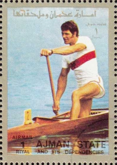 Reinhard Eiben